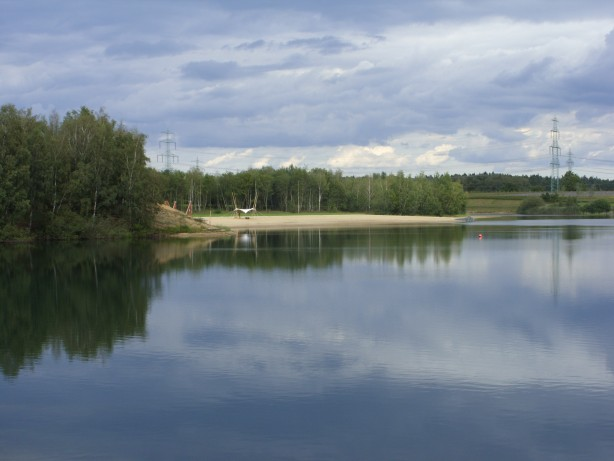 Landesgartenschau Norderstedt, Blick zum Strandbad